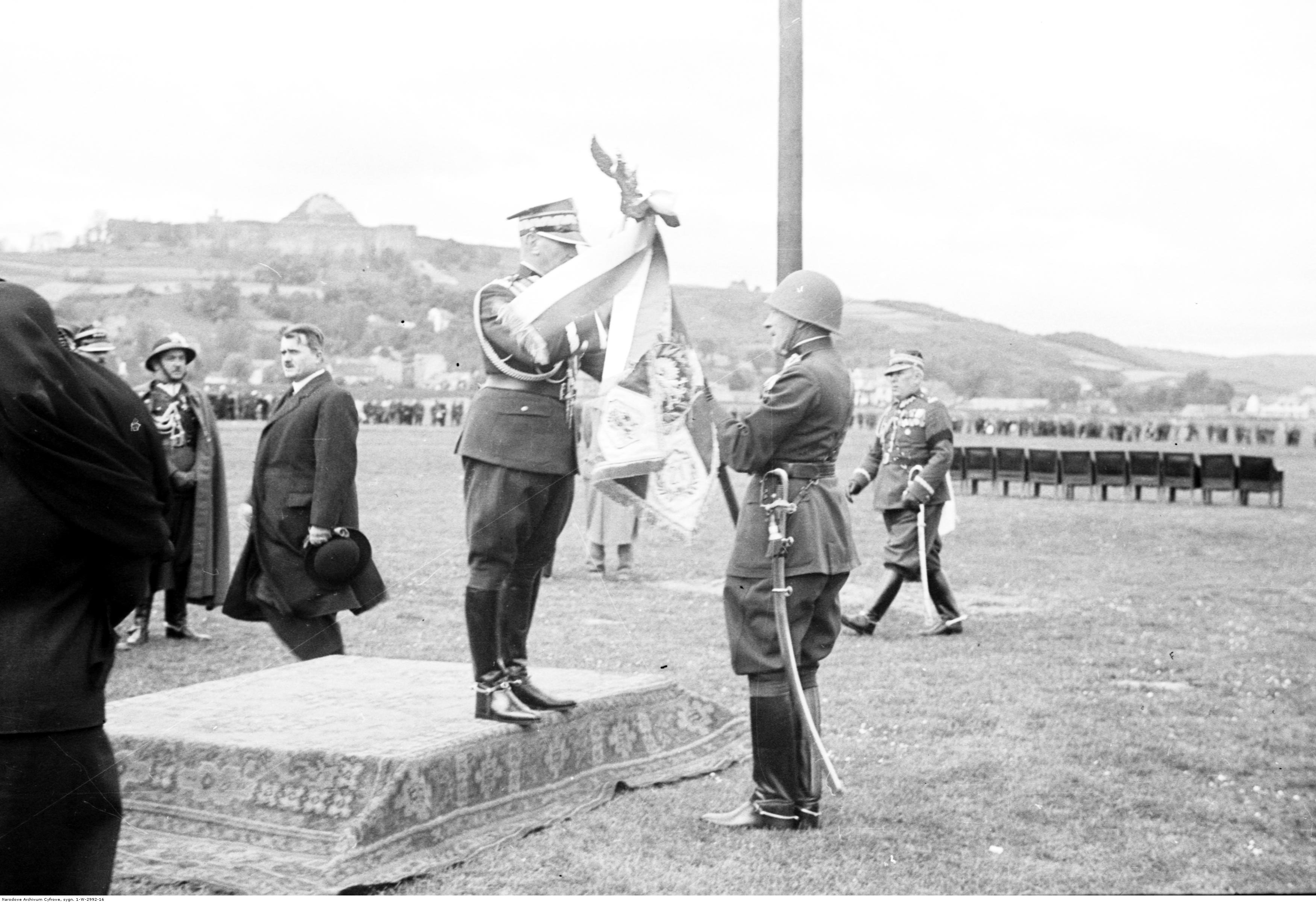 Wręczenie i poświęcenie sztandarów pułkom artylerii na Krakowskich Błoniach; 29 maj 1938. Dowódca 21 Pułku Artylerii Lekkiej odbiera sztandar z rąk Inspektora Armii gen. dyw. Juliusza Rómmla. Z prawej widoczny gen. bryg. Bernard Mond. Koncern Ilustrowany Kurier Codzienny - Archiwum Ilustracji. Sygnatura: 1-W-2992-16